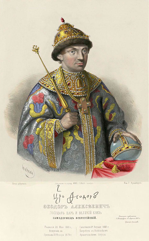 Борель П.Ф. Федор Алексеевич, Государь Царь и Великий Князь Самодержец Всероссийский. // Издание «Российский царственный дом Романовых». СПб.: Издание Г.К. Фриденбурга, 1853.